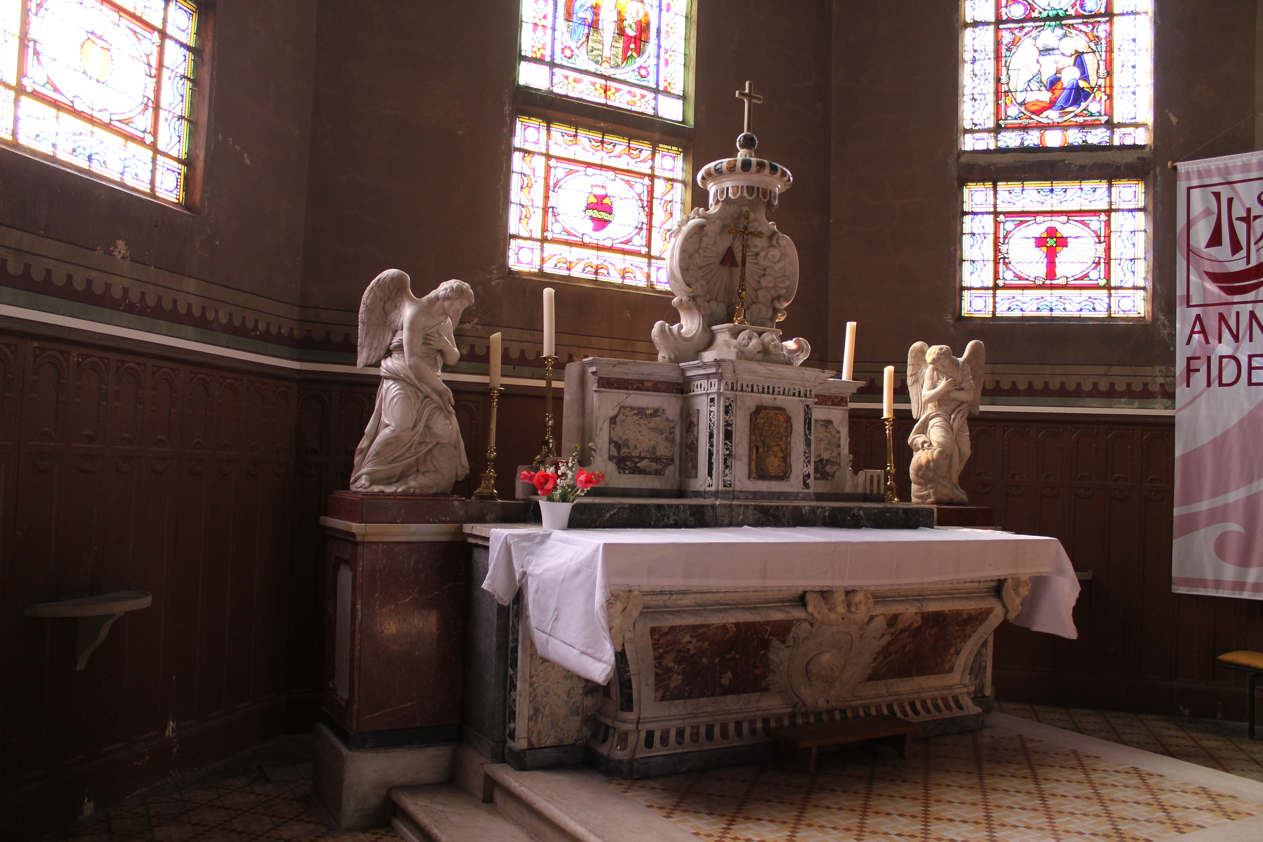 Maitre Autel de l'église de Brocas